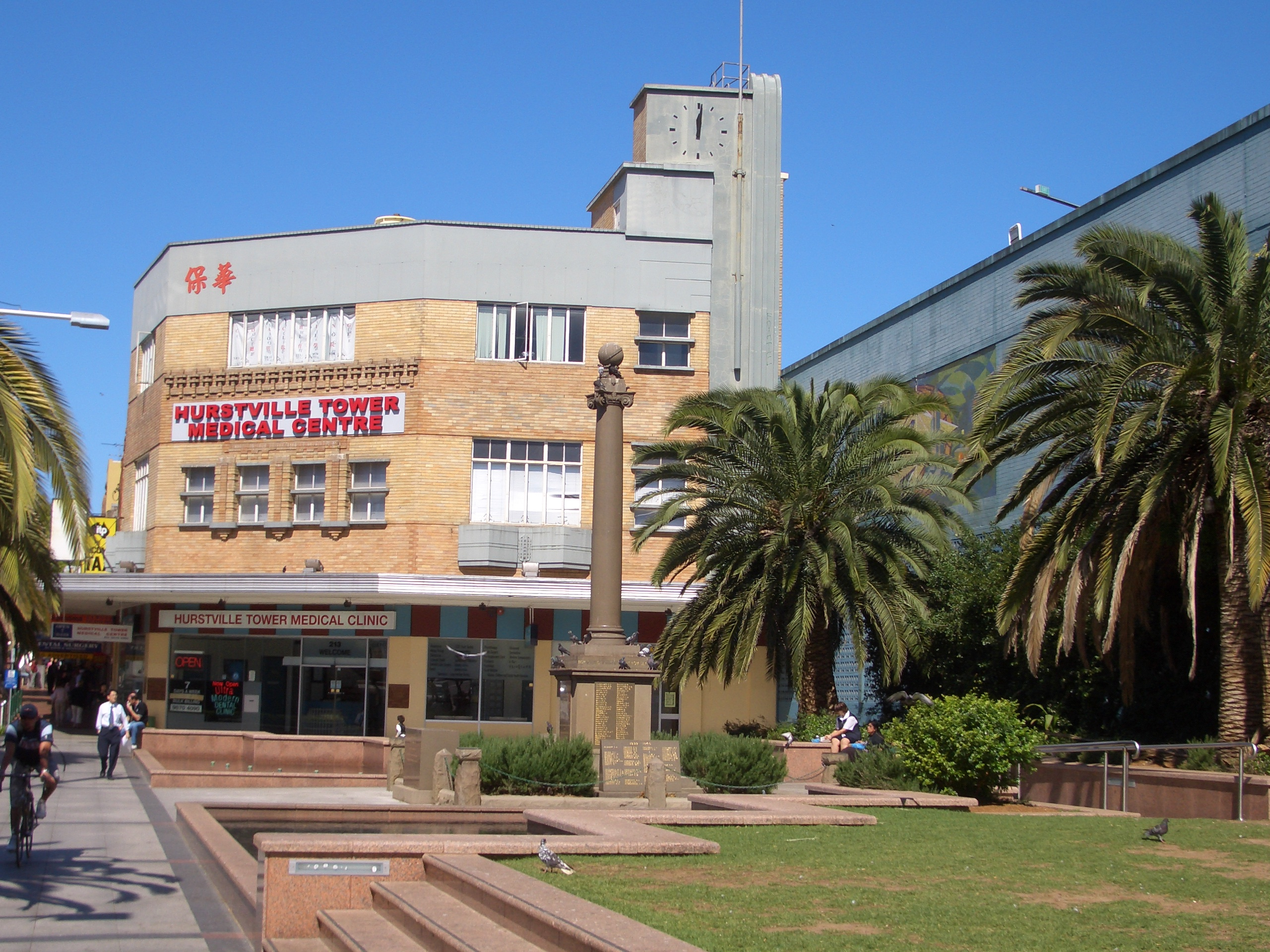 Forest Road, Hurstville, Sydney